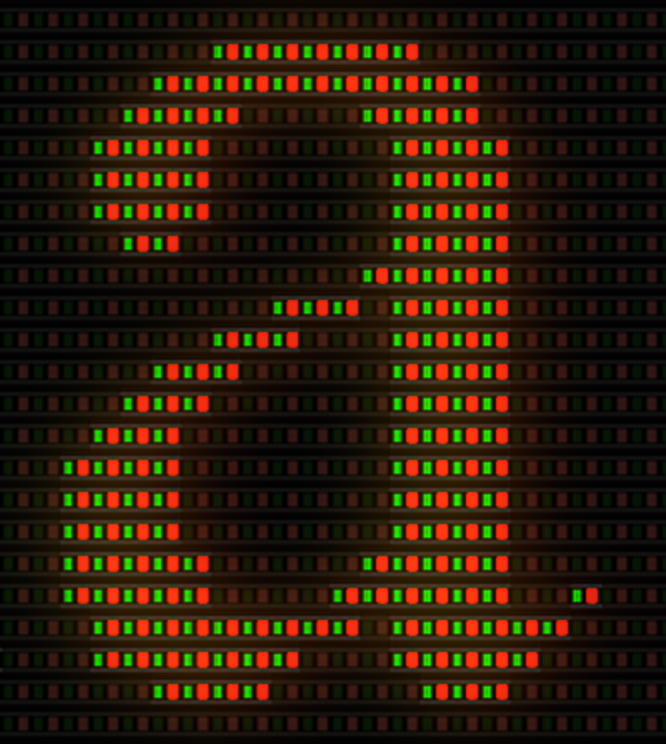 Reproduction graphique d'un écran à leds rouges et vertes utilisé lors du jeu télévisé français L'Or à l'appel en 1996-1997. La reproduction a été faite à partir de plans rapprochés de l'écran sur des enregistrements VHS de l'émission, ainsi que sur les informations de l'entreprise l'ayant conçu.